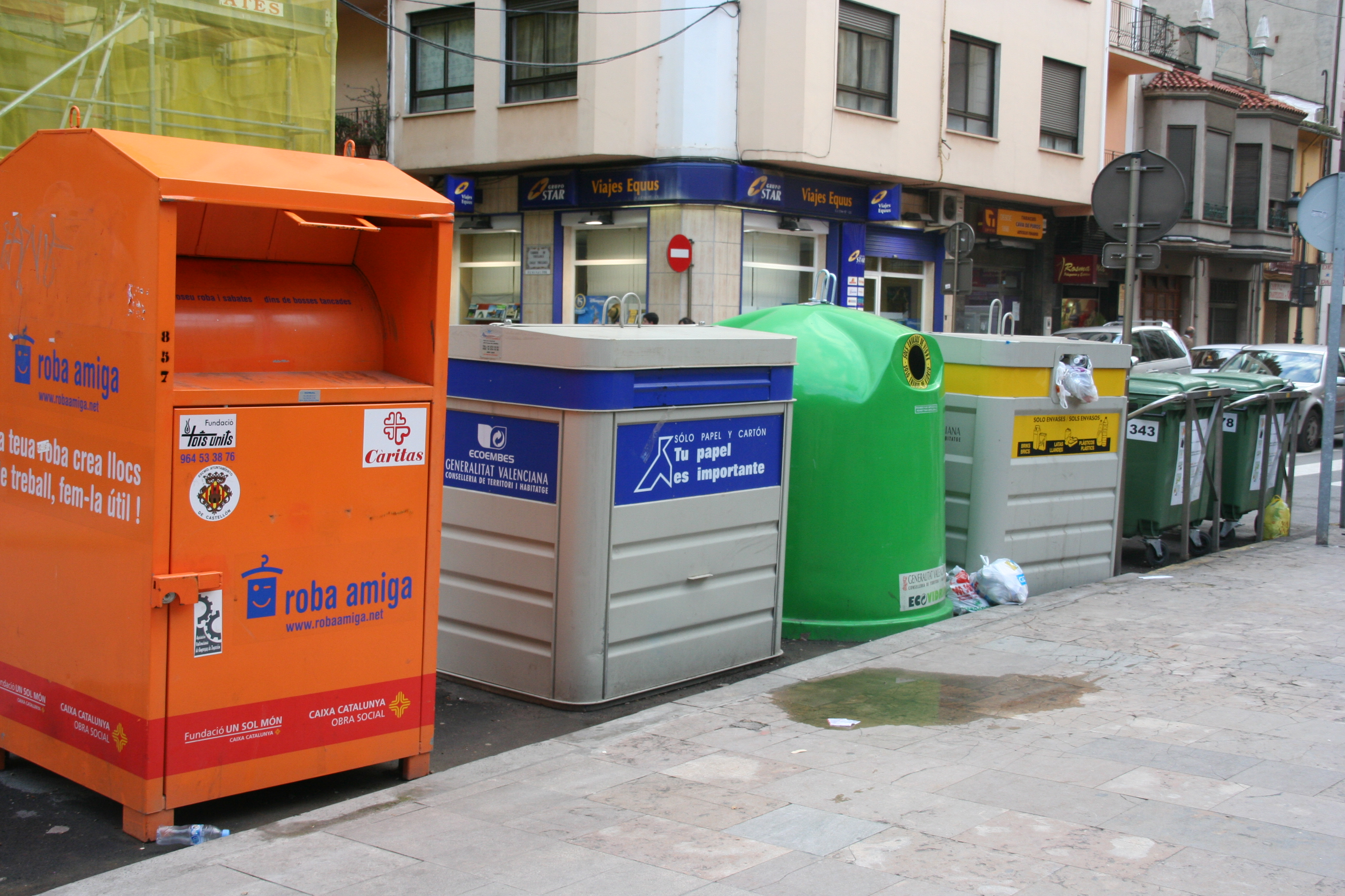 Contenedores de reciclaje de Castellón de la Plana (España)